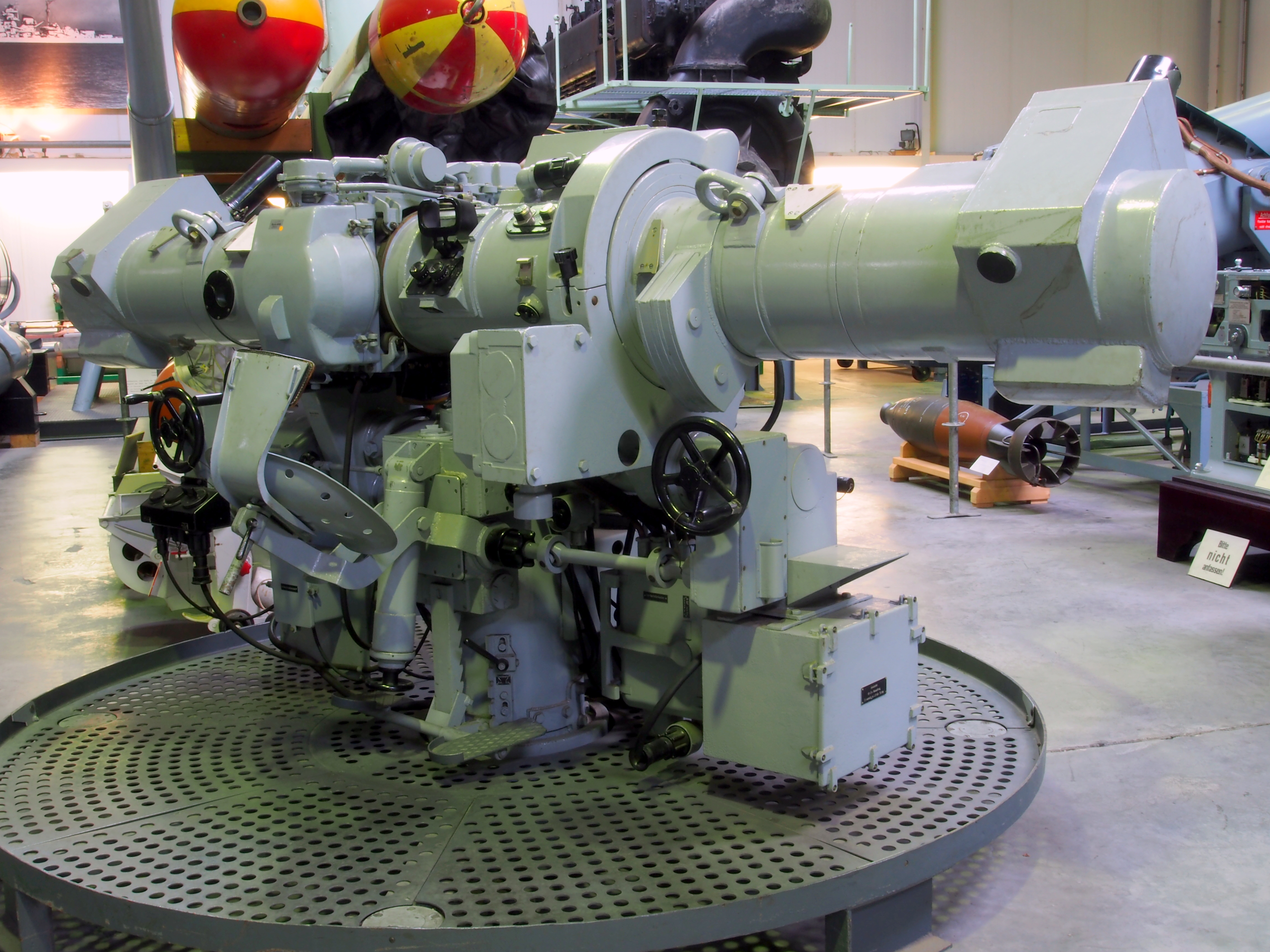 Carl Zeiss 3 m R.U. Flak-Entfernungsmesser